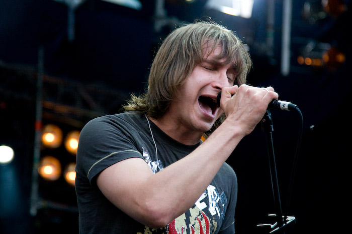 Oleg Sobchuk (С.К.А.Й.)